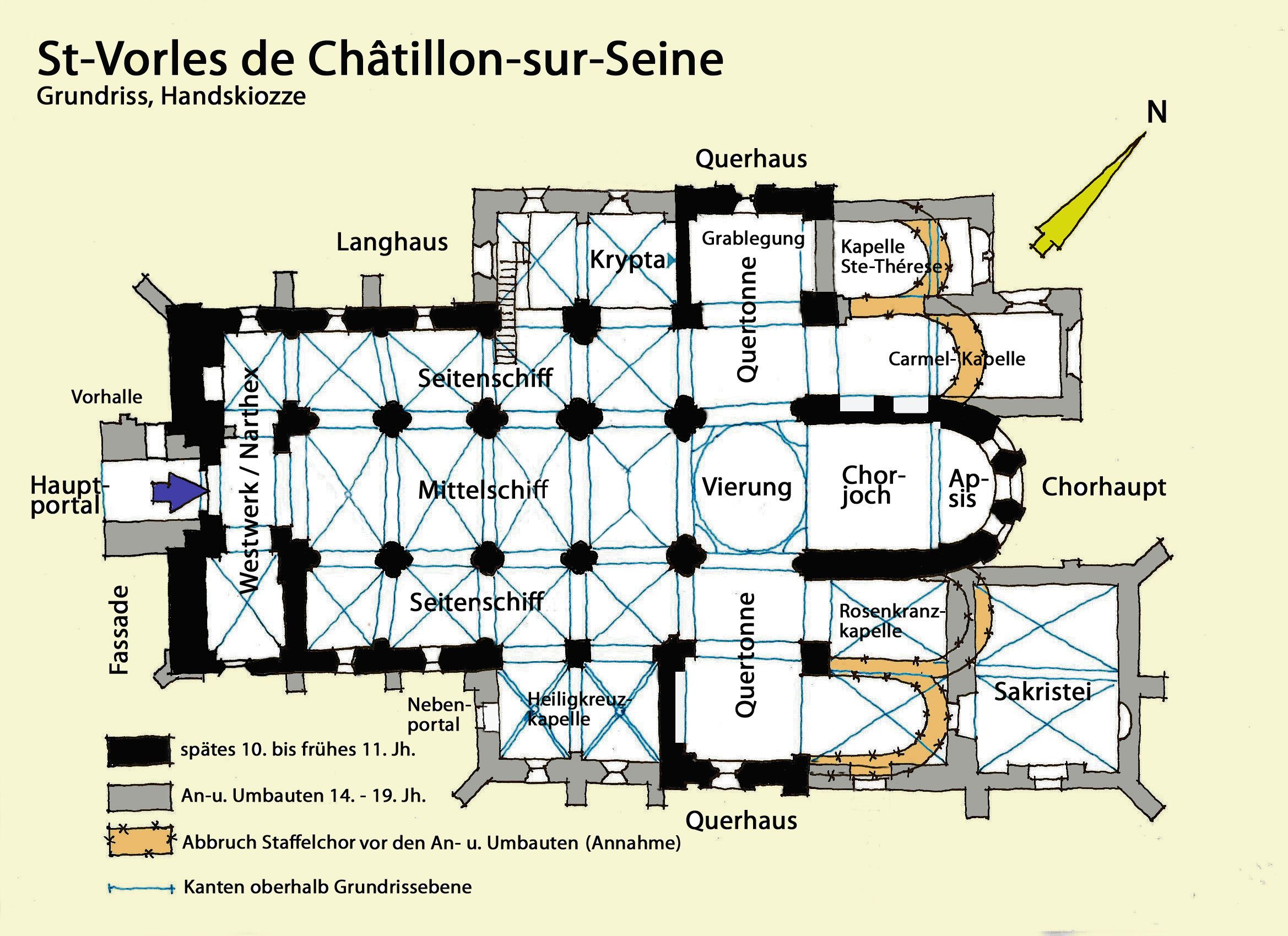 St-Vorles de Châtillon, Grundriss, Handskizze